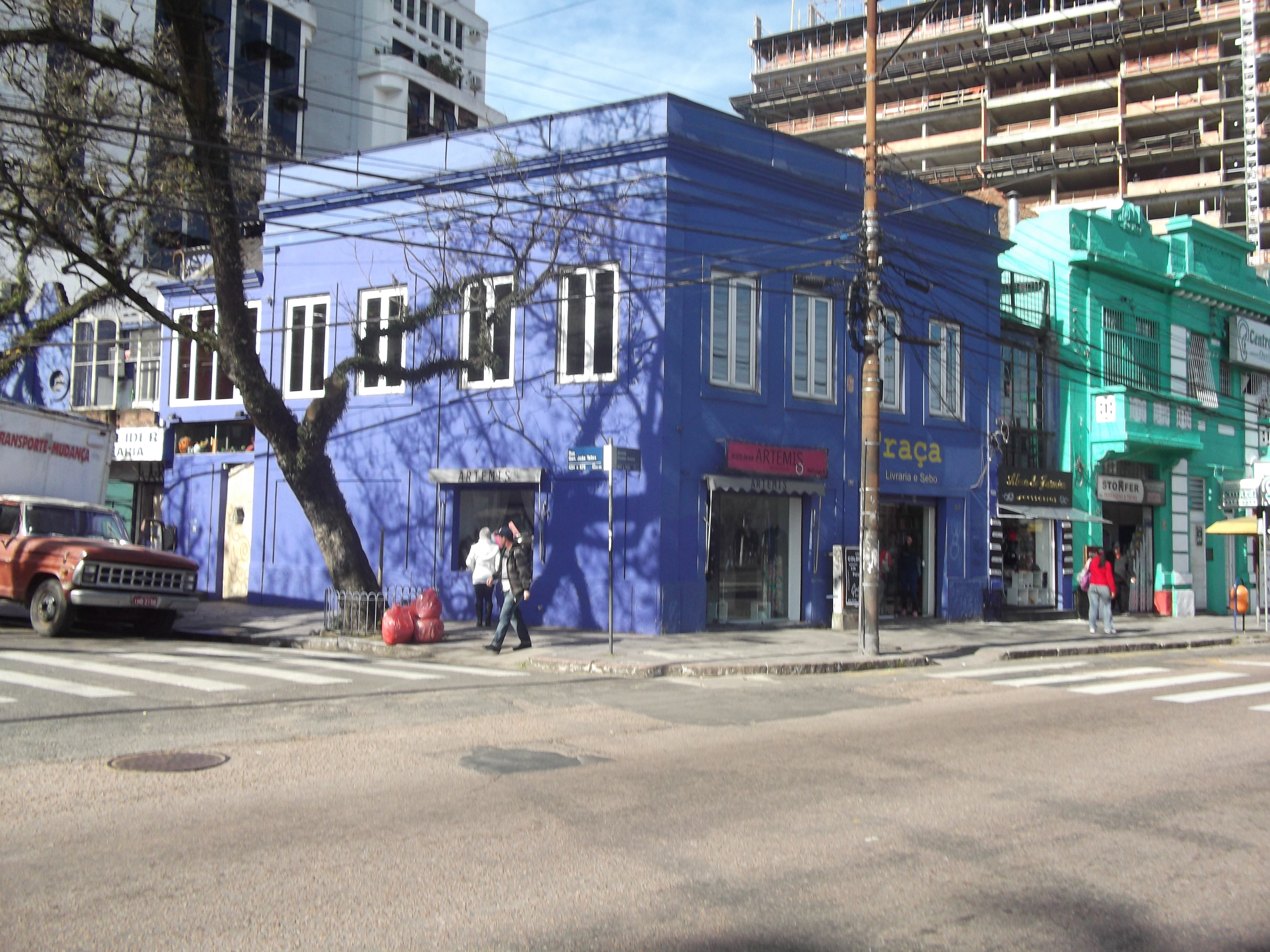 Bar Ocidente e Livraria Traça, Bom Fim, Porto Alegre, Brasil